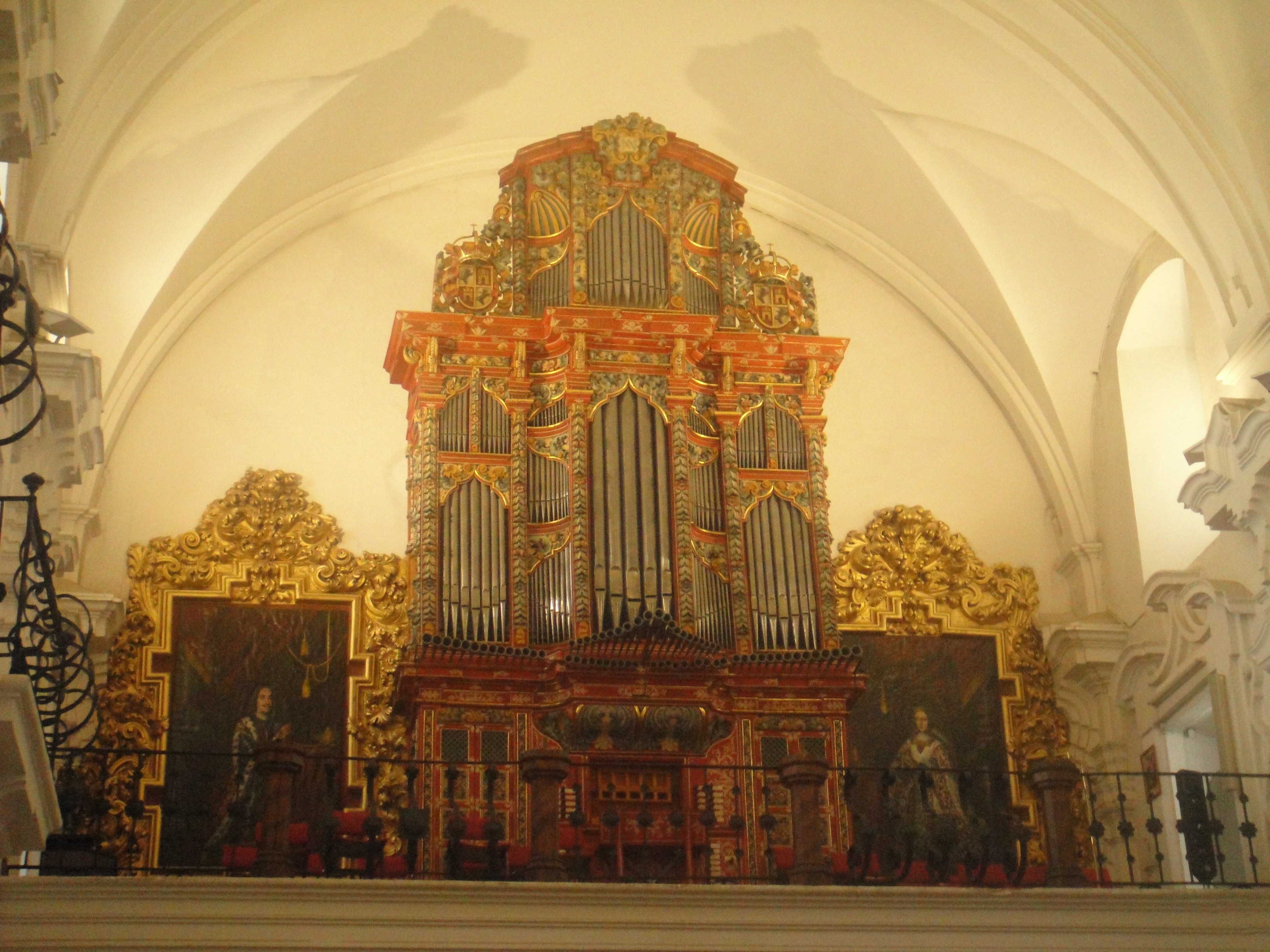 Órgano de la iglesia de San Hipólito de Córdoba. Fue construído por Joseph Corbacho en 1735, y está considerado uno de los más importantes de Andalucía. Se trata de un órgano de dos teclados de 45 teclas con octava corta, y disponen de una decoración a base de puntos característica de la zona cordobesa, con una octava de contras, y fue restaurado en el año 2007. Provincia de Córdoba, (España).